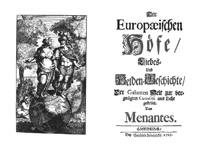 (Hunold, Christian Friedrich ) Menantes, Der Europäischen Höfe Liebes- und Helden-Geschichte (Hamburg: G. Liebernickel, 1705). Der/ Europæischen/ Höfe,/ Liebes-/ Und/ Helden-Geschichte,/ Der Galanten Welt zur ver-/gnügten Curiosité ans Licht/ gestellet./ Von/ Menantes./ linie/ HAMBURG,/ linie/ Bey Gottfried Liebernickel, 1705.